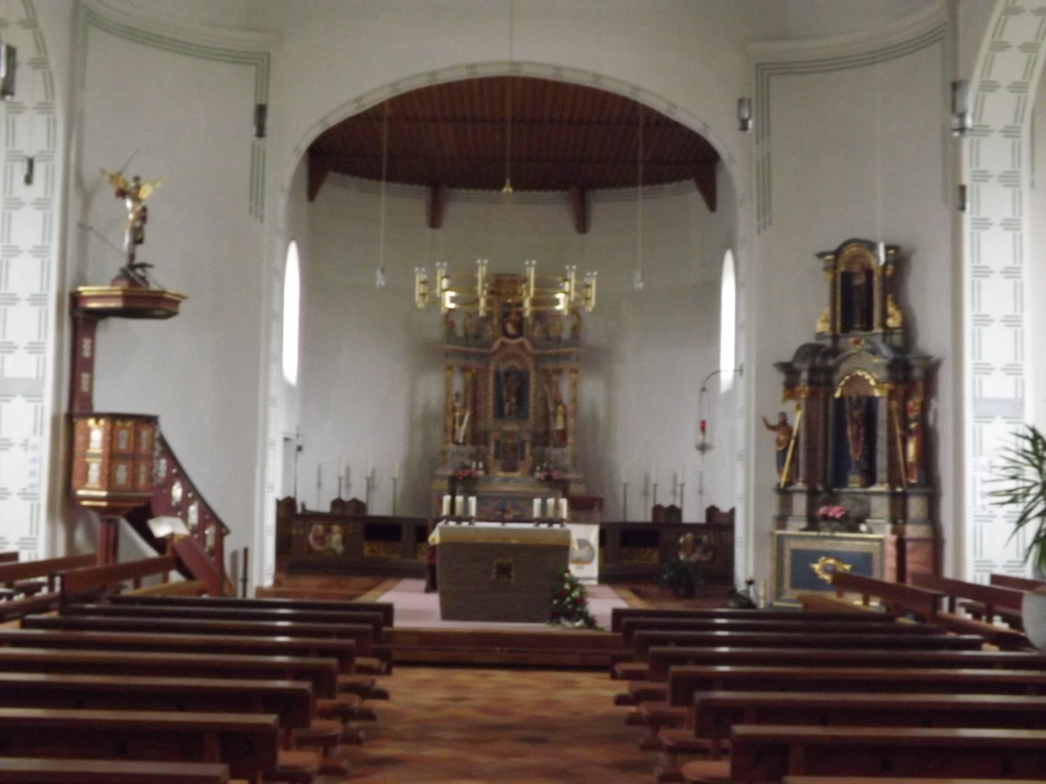 Der Altarraum in St. Remigius in Pronsfeld